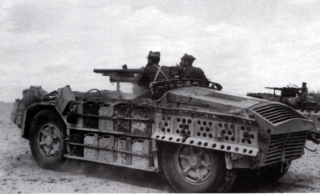 AS.42 /Cannone da 47/32 M35